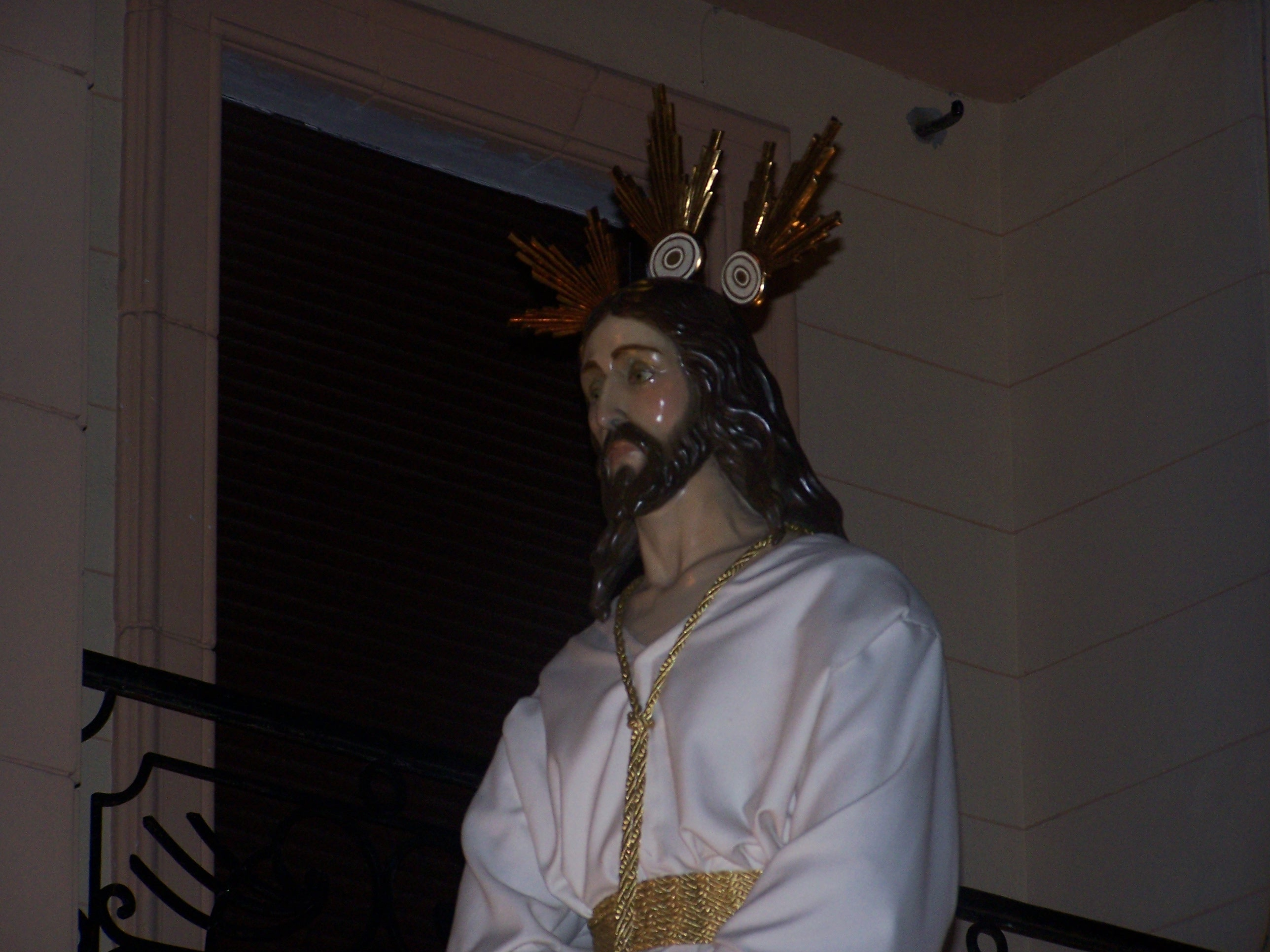 Detalle del Jesús Cautivo, Hermandad de la Santa Cena, Astorga (León, España).